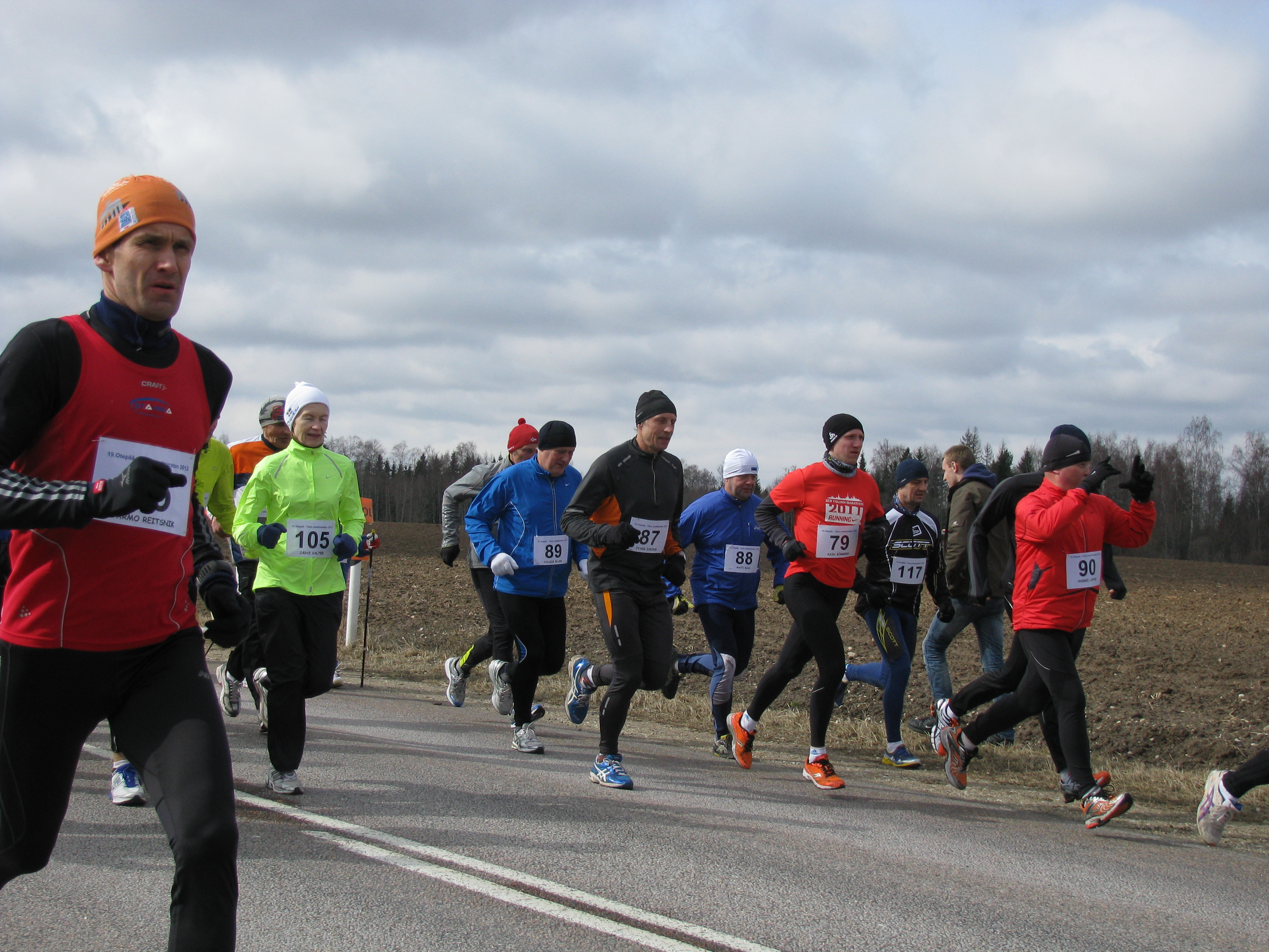 Otepää-Tartu maraton